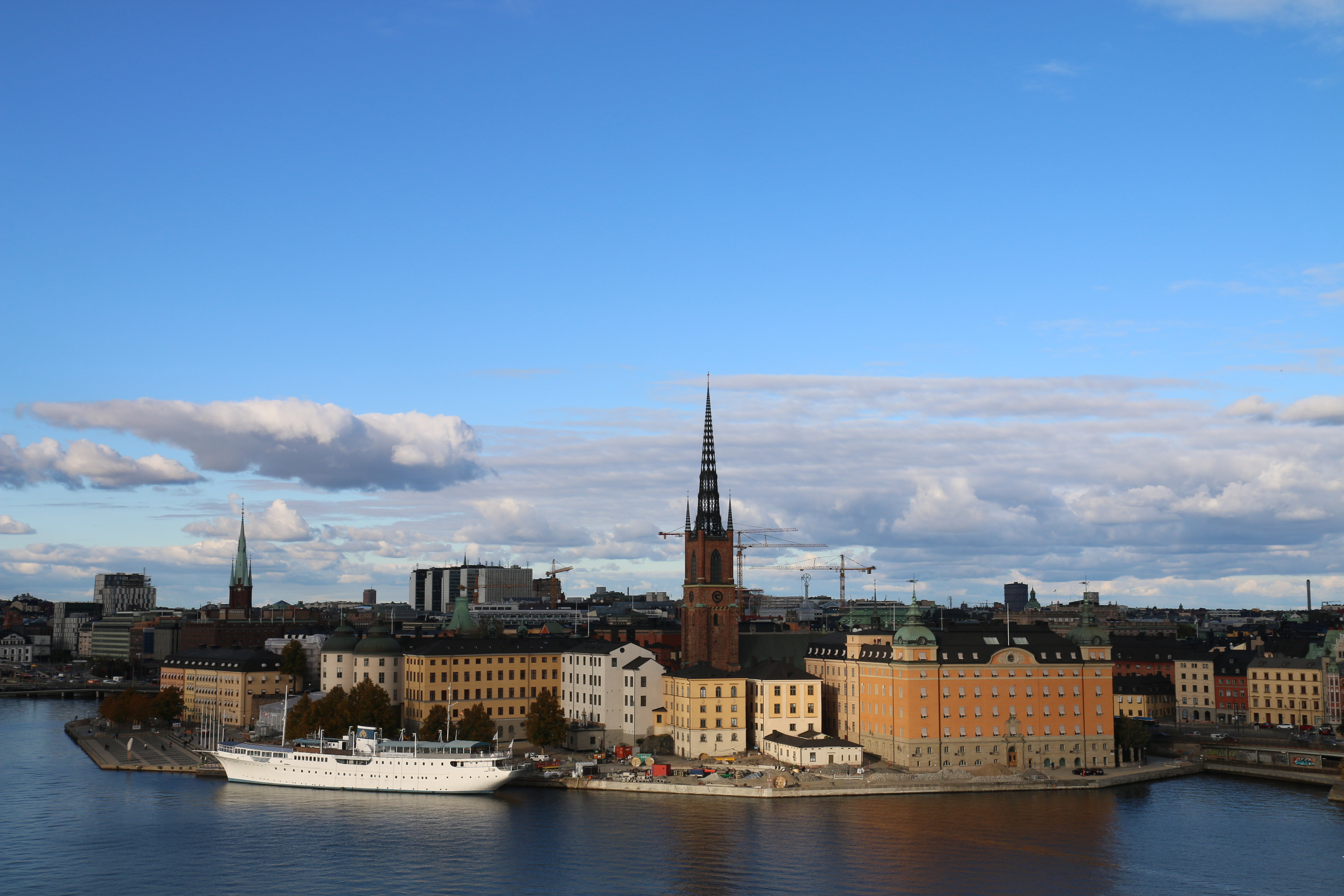 Riddarholmen